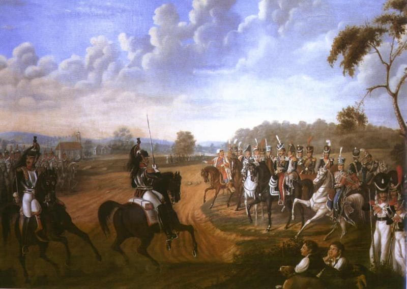 Chylewski Michał. Przegląd 14. pułku kirasjerów przed ks. Józefem.